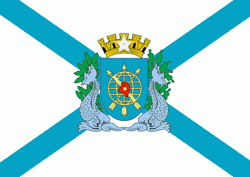 Bandeira do Estado da Guanabara (1960–1975)